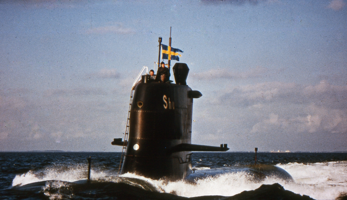 Den svenska ubåten HMS Sjöhunden (Shu).